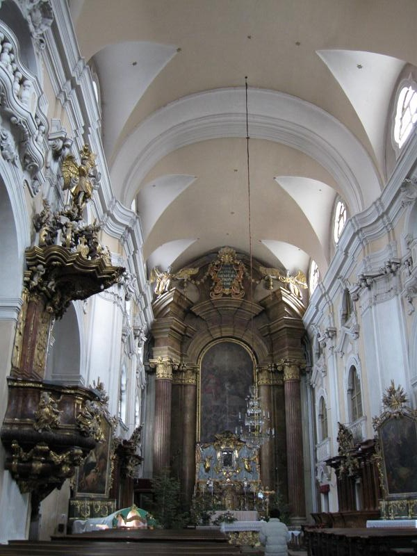 Eglise des piaristes de Cluj.